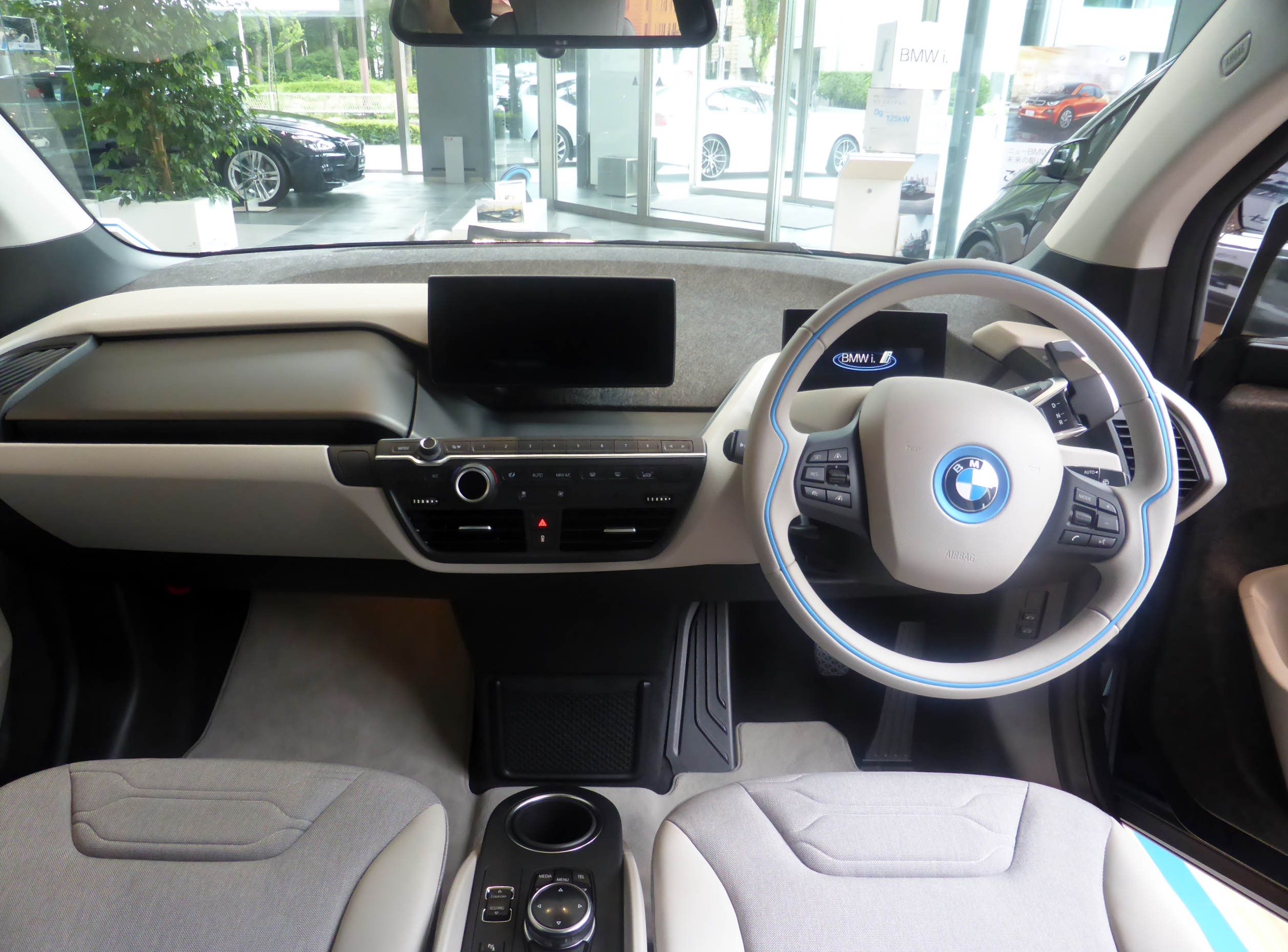 BMW・i3のインテリアを撮影。